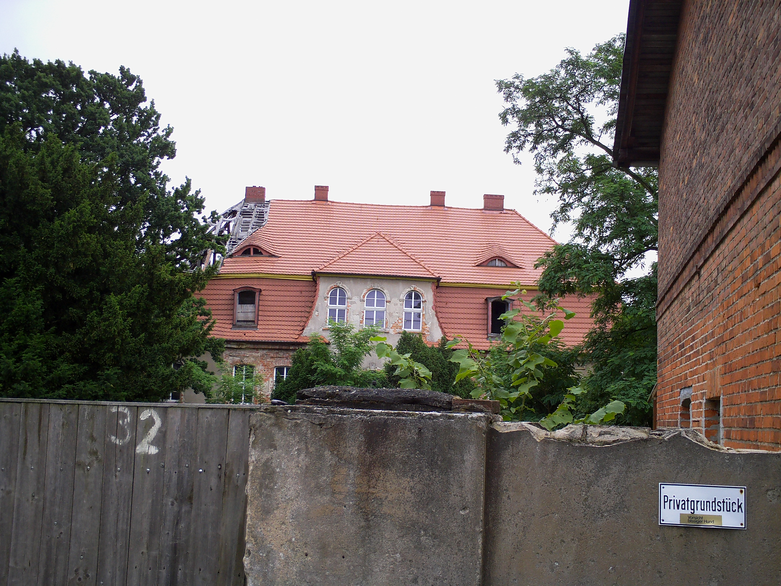 Herrenhaus des denkmlageschützten Gutshofes Schlichow in Cottbus-Schlichow.